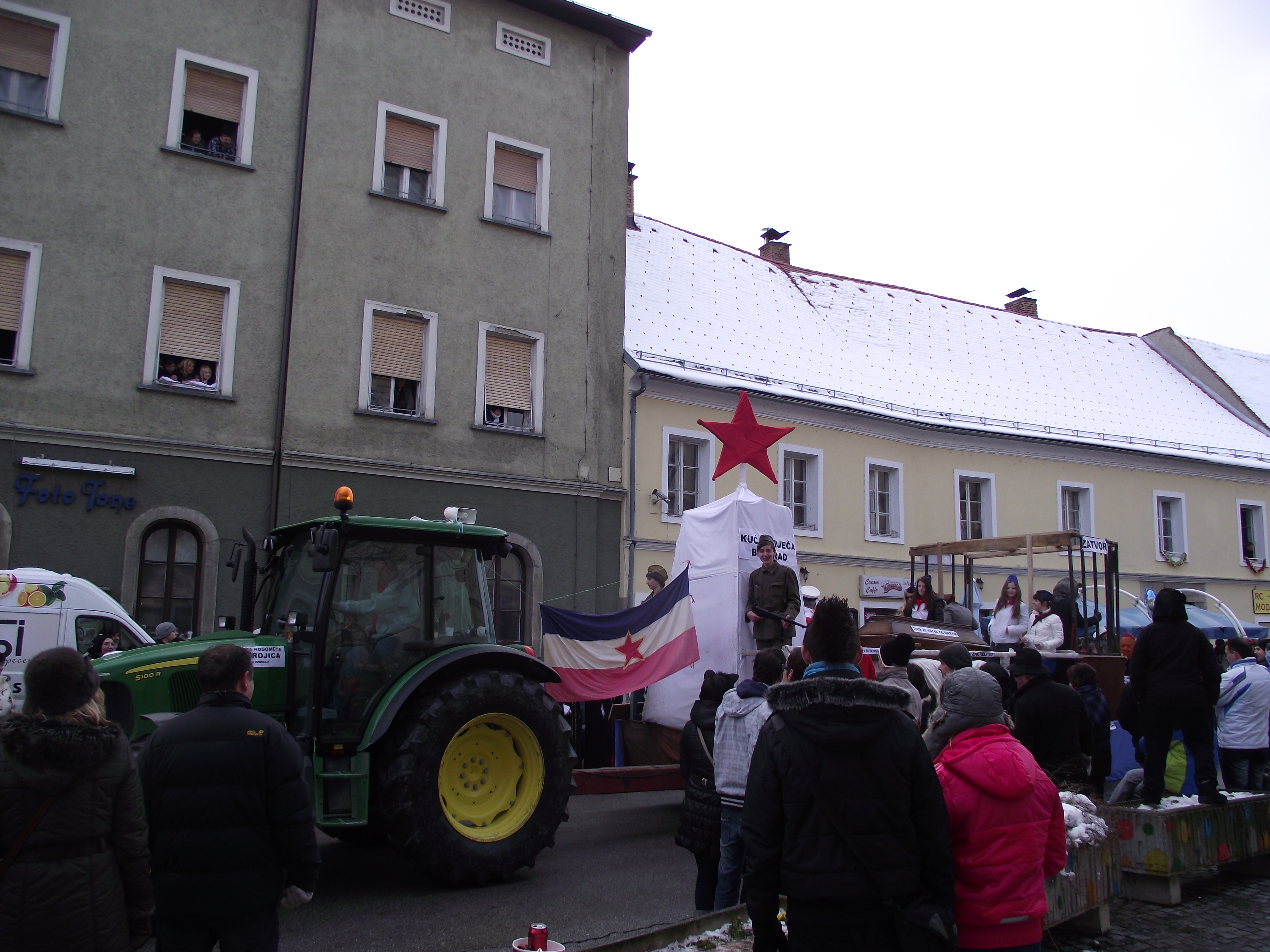 Ptuj